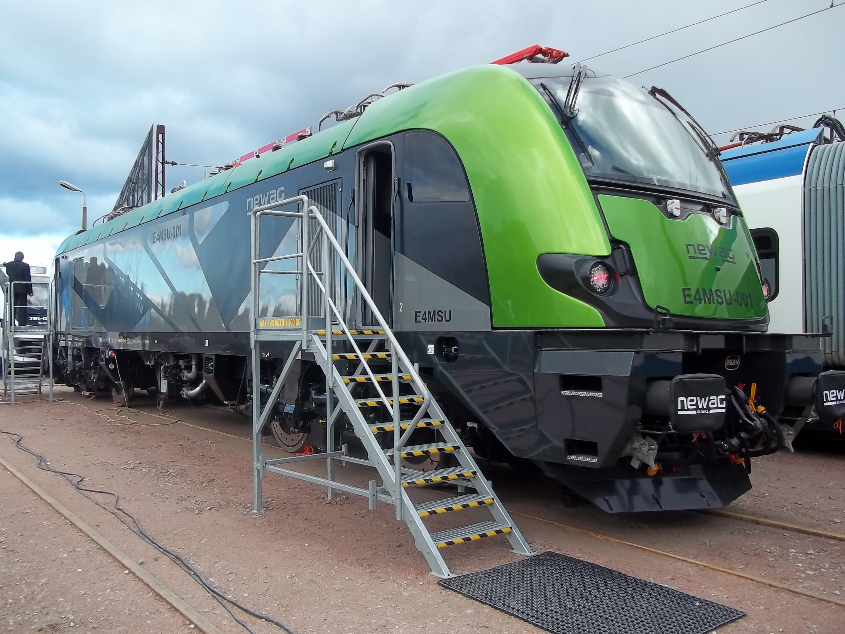 Czteroosiowa lokomotywa elektryczna Newag E4MSU-001 "Griffin".